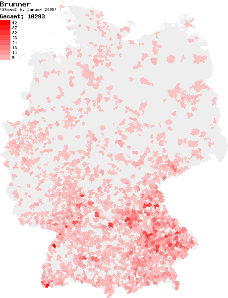 Verteilung des Nachnamens Brunner in Deutschland nach dem Telefonbuch mit Stand vom 6. Januar 2005